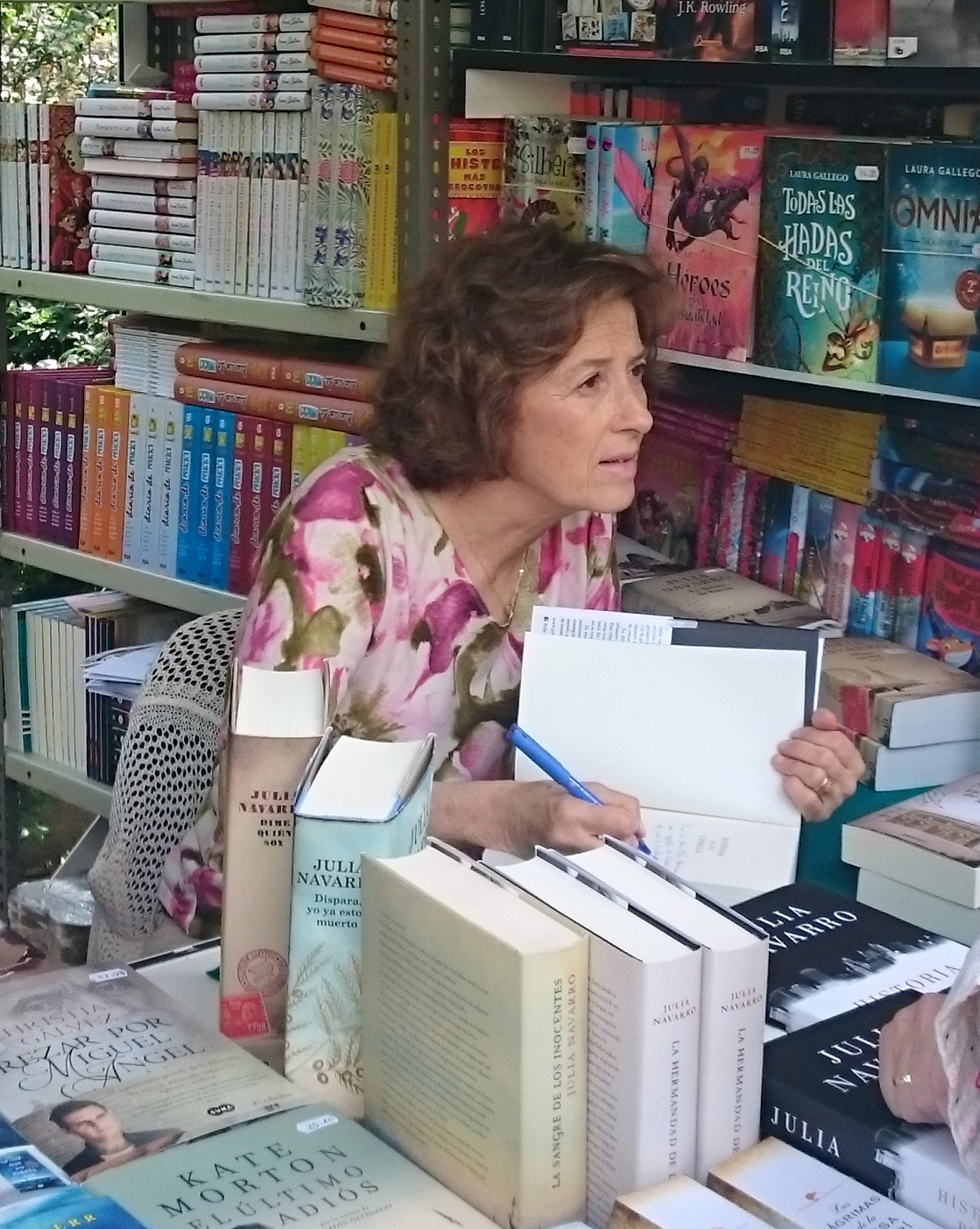 Julia Navarro en la Feria del Libro de Madrid de 2016